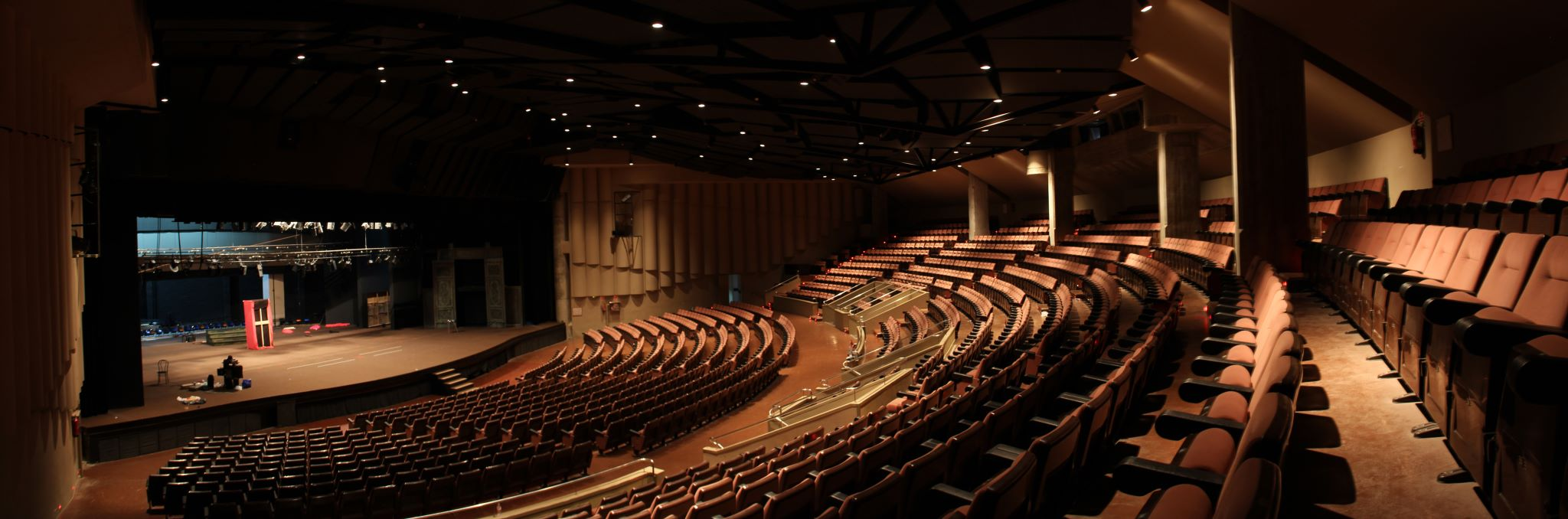 Vista lateral del patio de butacas y del escenario durante la preparación de una obra